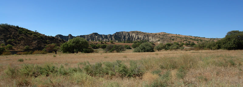 Vashlovani State Reserve